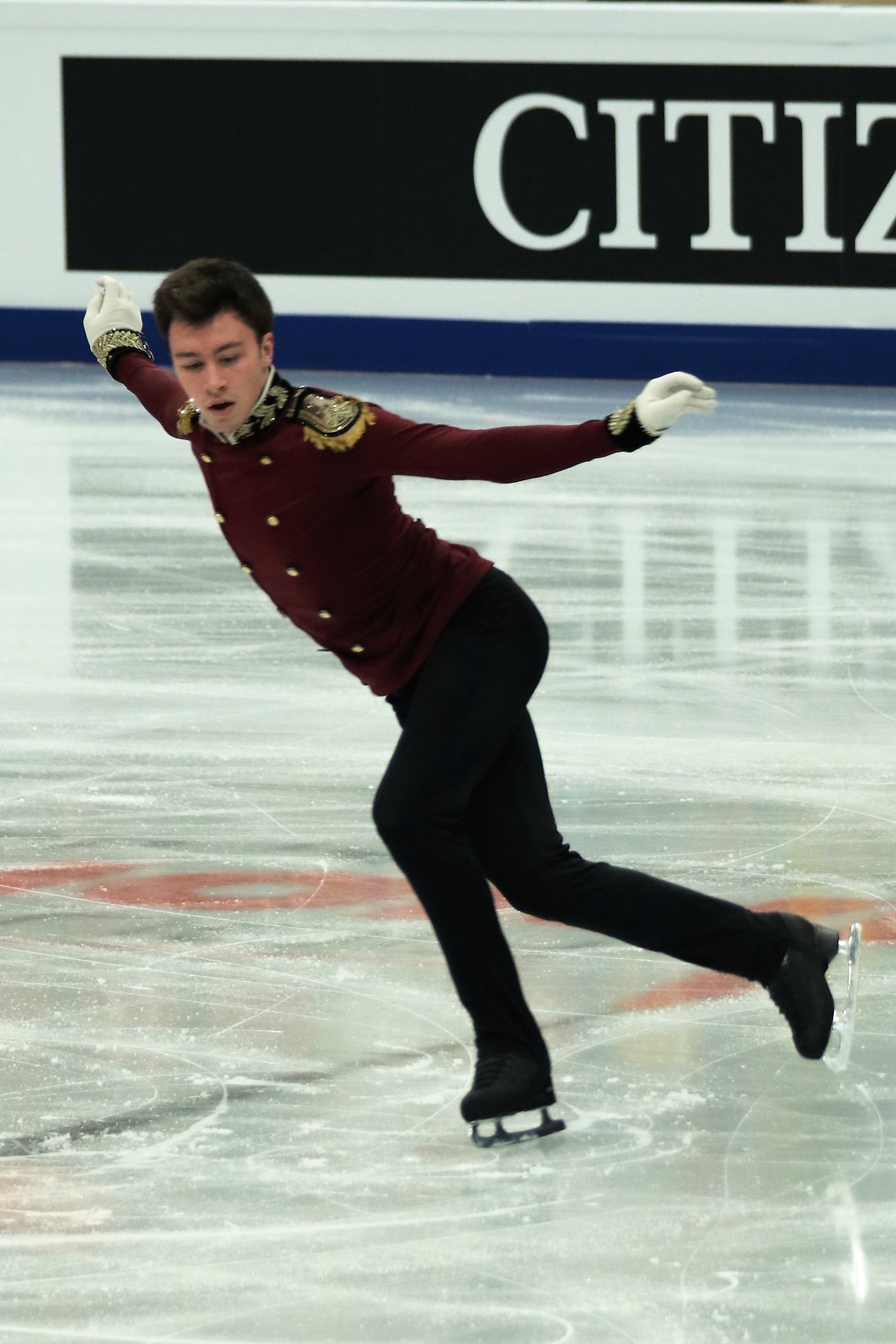 Дмитрий Алиев (Россия) на Чемпионате Европы по фигурному катанию 2018.